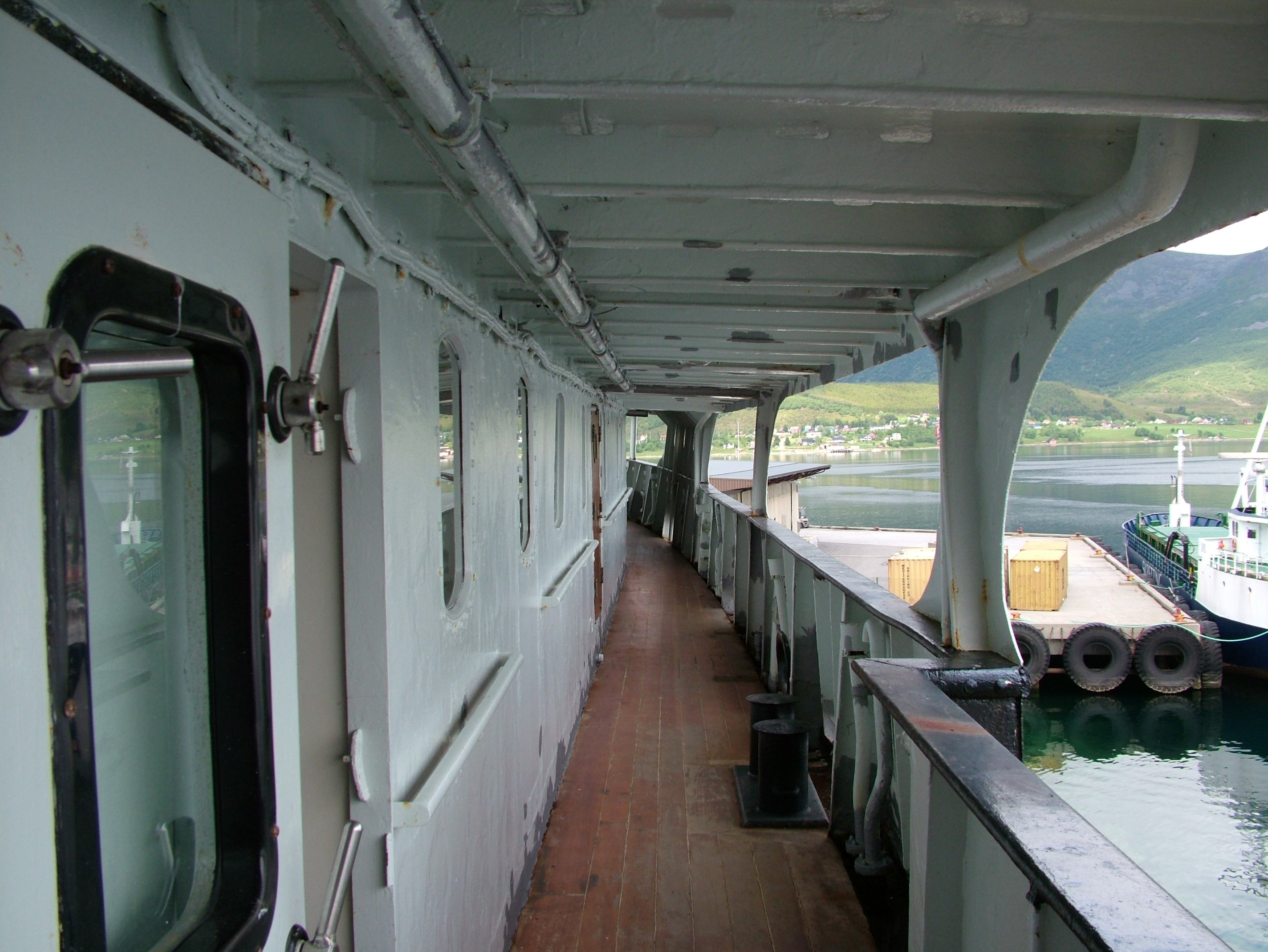 Im Hurtigruten Museum in Stokmarknes der Rundgang auf der alten MS Finnmarken